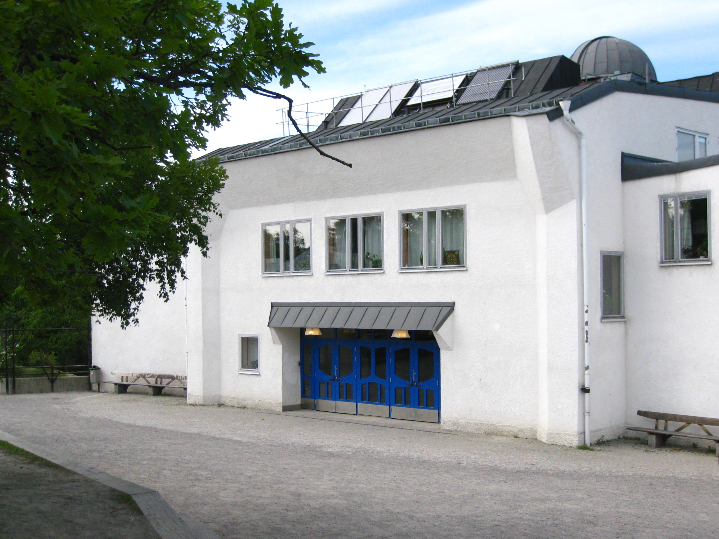 Kristofferskolan, Åkeslund, Bromma, västra Stockholm